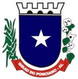 Brasão da cidade de Girau do Ponciano - Alagoas